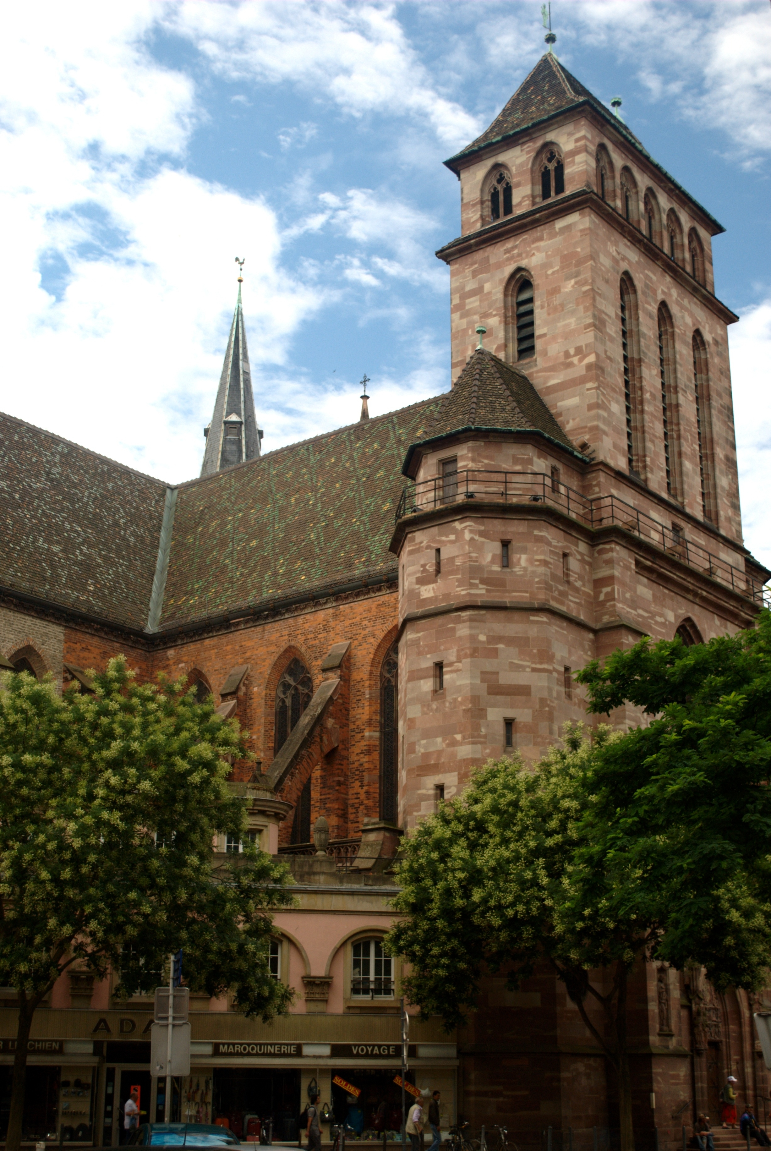 Saint-Pierre-le-Vieux, Strasbourg